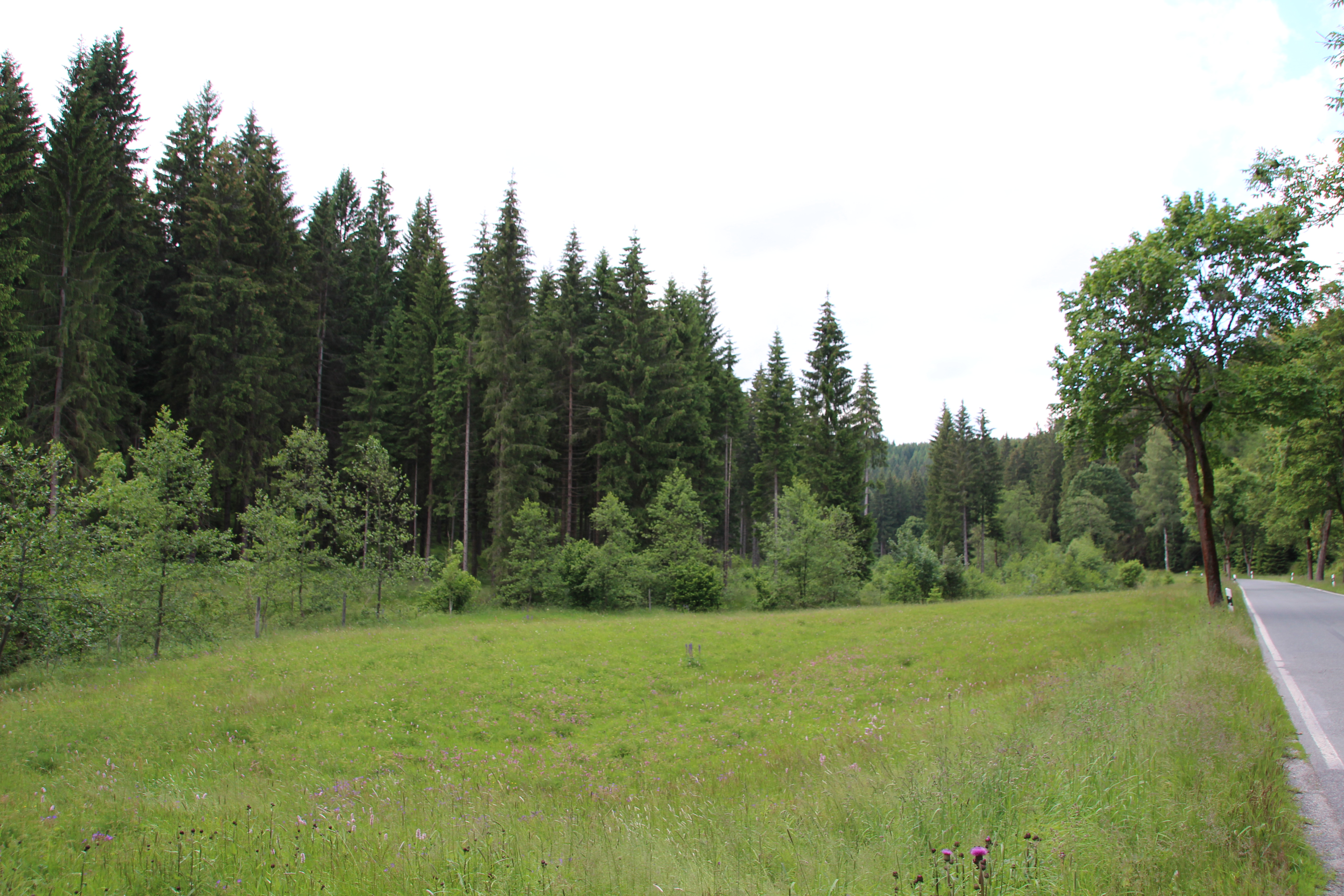 Wilzsch: Fluss und Tal bei Neues Wiesenhaus, einer Siedlung an der Wilzsch oberhalb von Wilzschhaus.